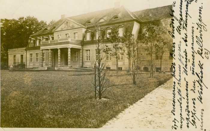 Pocztówka z widokiem pałacu, widok od strony ulicy